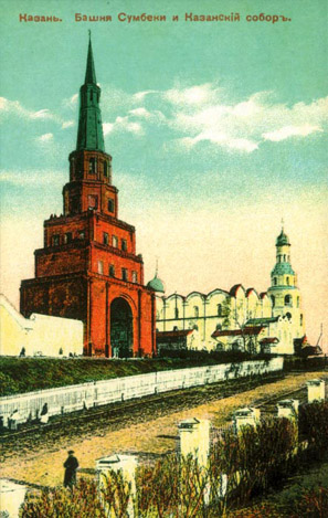 Söyembikä-toren in Kazan, afgebeeld op vroeg-20e-eeuwse ansichtkaart